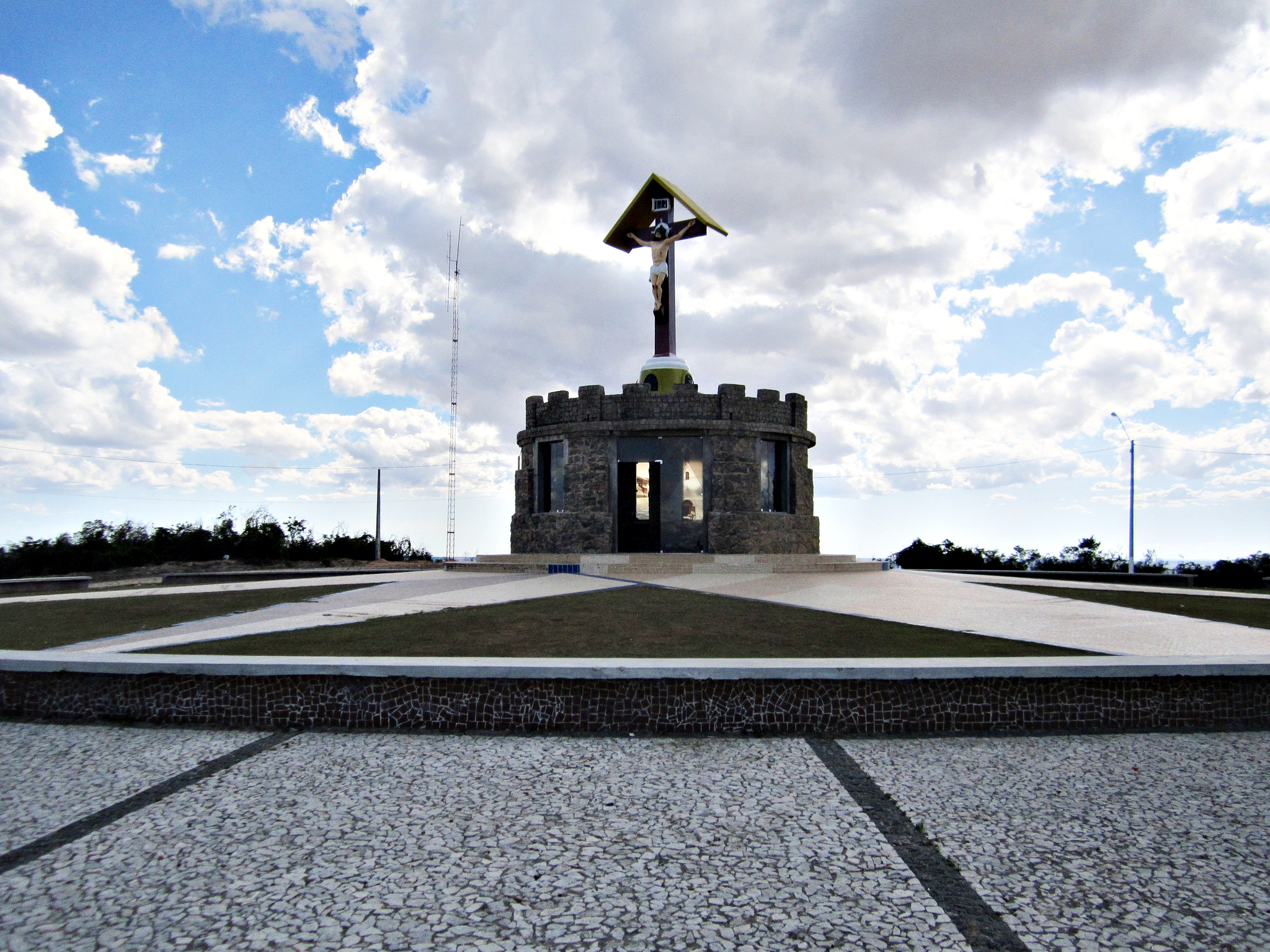 Cristo do Magano - Garanhuns, Pernambuco, Brasil